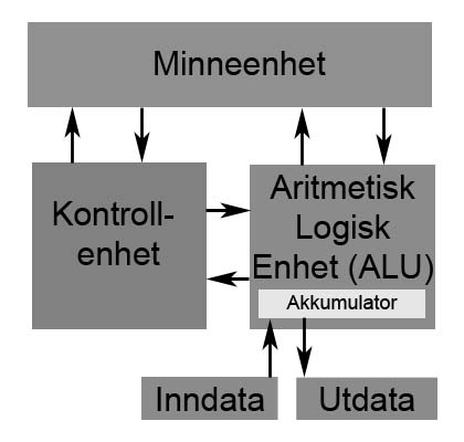 Von Neumann-arkitekture inn norwegian.